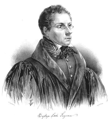 Krystyn Lach Szyrma